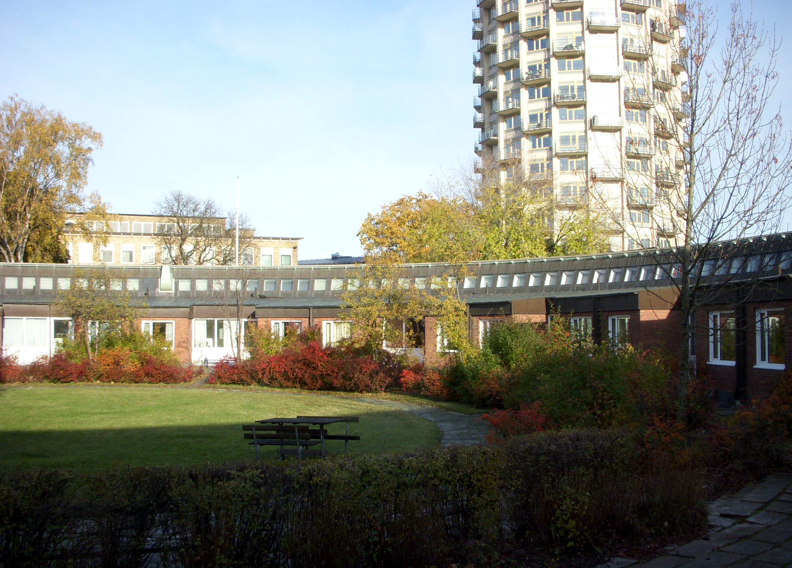 Kungliga Musikhögskolan i Stockholm, innergården